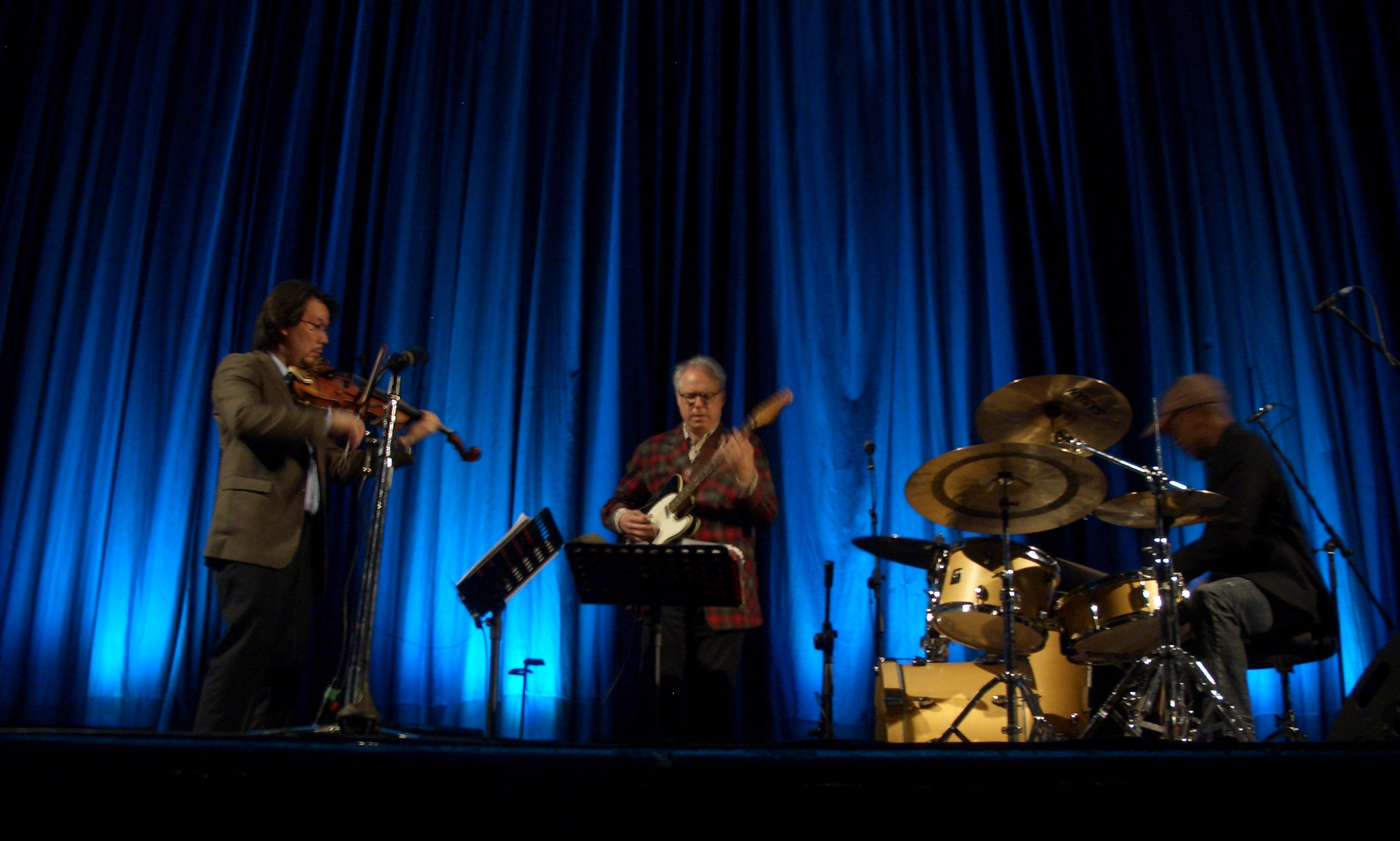 Da sinistra a destra: Eyvind Kang alla viola, Bill Frisell alla chitarra e Rudy Royston alla batteria: Bill Frisell Trio - Beautiful Dreamers, Catania, 31 marzo 2014, Teatro Odeon, per l'Associazione Musicale Etnea